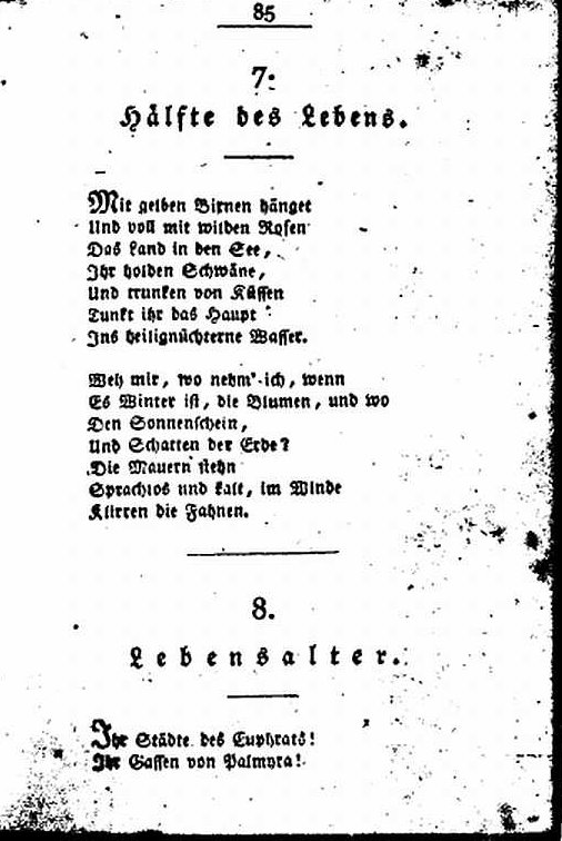 Erstdruck von Hälfte des Lebens im Taschenbuch für das Jahr 1805. Der Liebe und Freundschaft gewidmet.